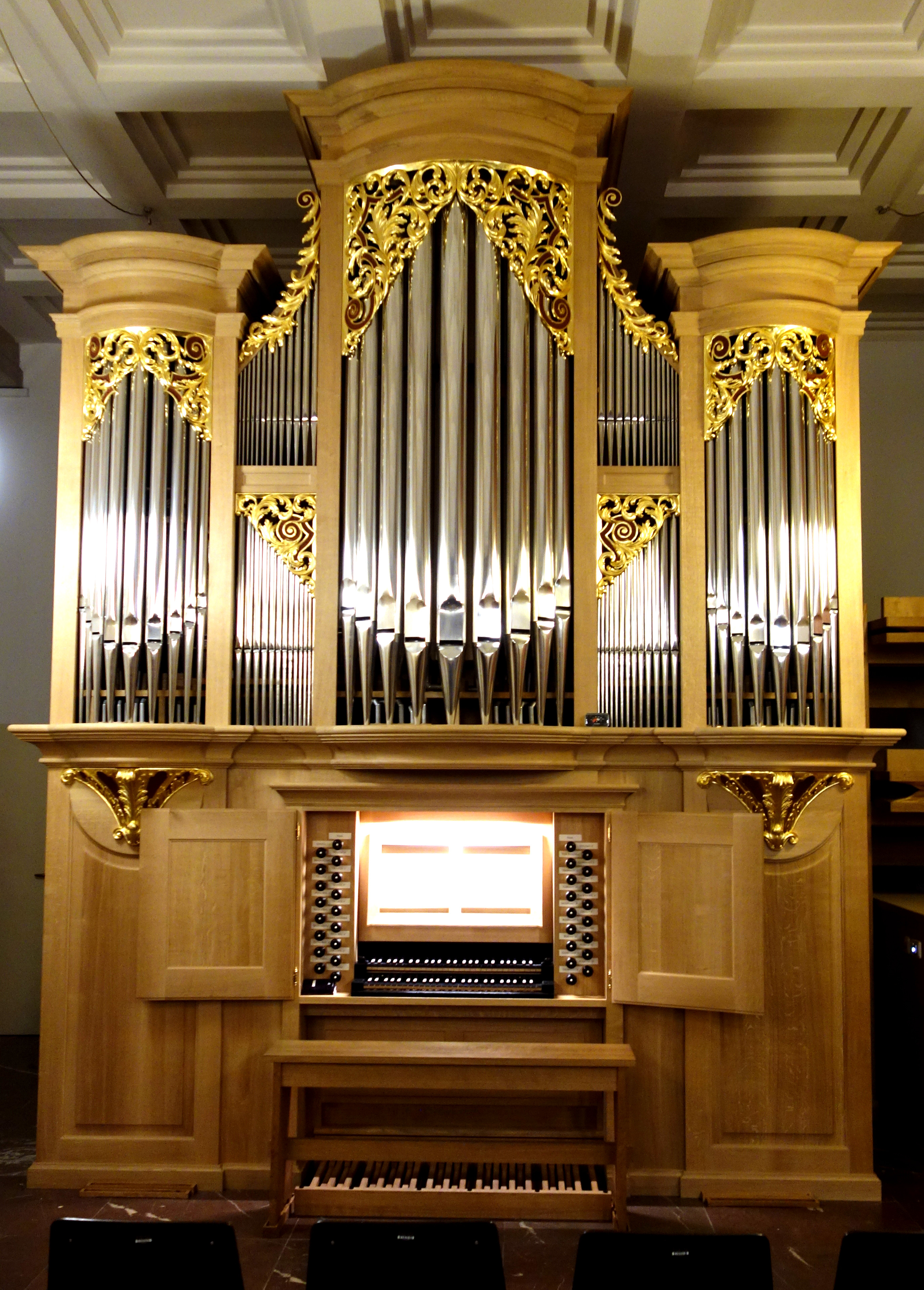 West-Orgel der Hochschule für Musik und Theater München (2019, Rowan West, II/28)